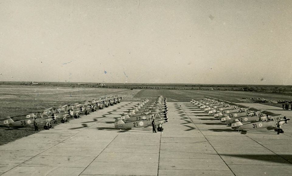 El 16 de diciembre de 1937, se realiza el primer vuelo del biplano de escuela y acrobacia Focke Wulf 44, producido bajo licencia alemana en la Fábrica Militar de Aviones. El piloto de este vuelo de prueba fue el sargento Santiago S. Germanó.